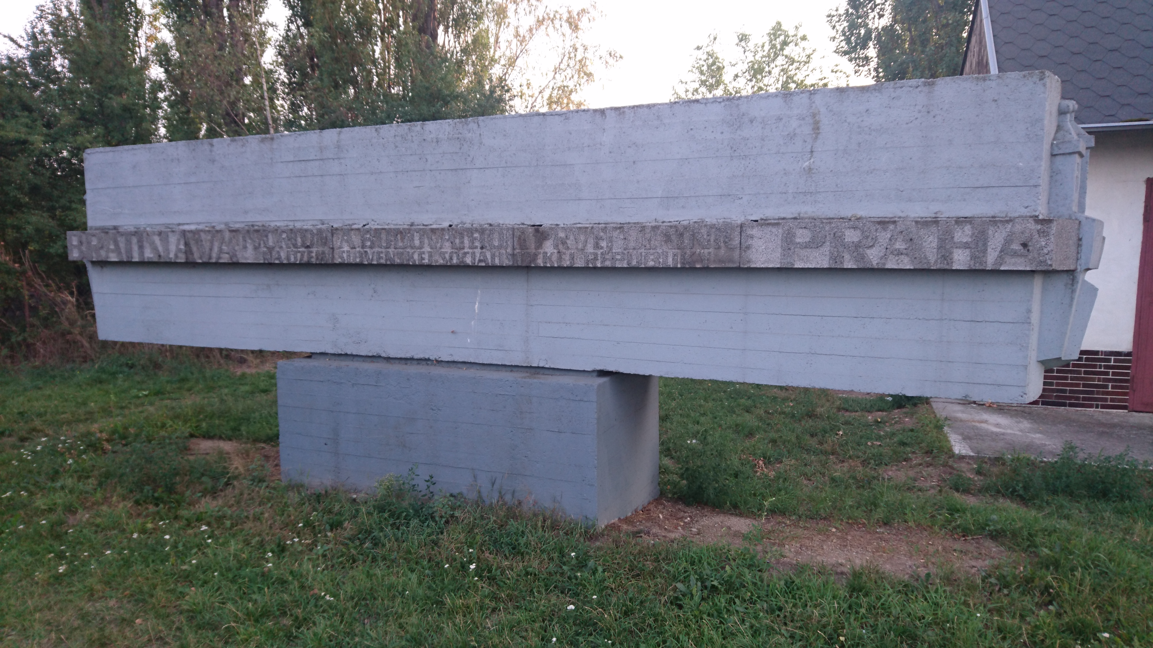 Pamätník tvorcom a budovateľom prvej diaľnice na území Slovenska.